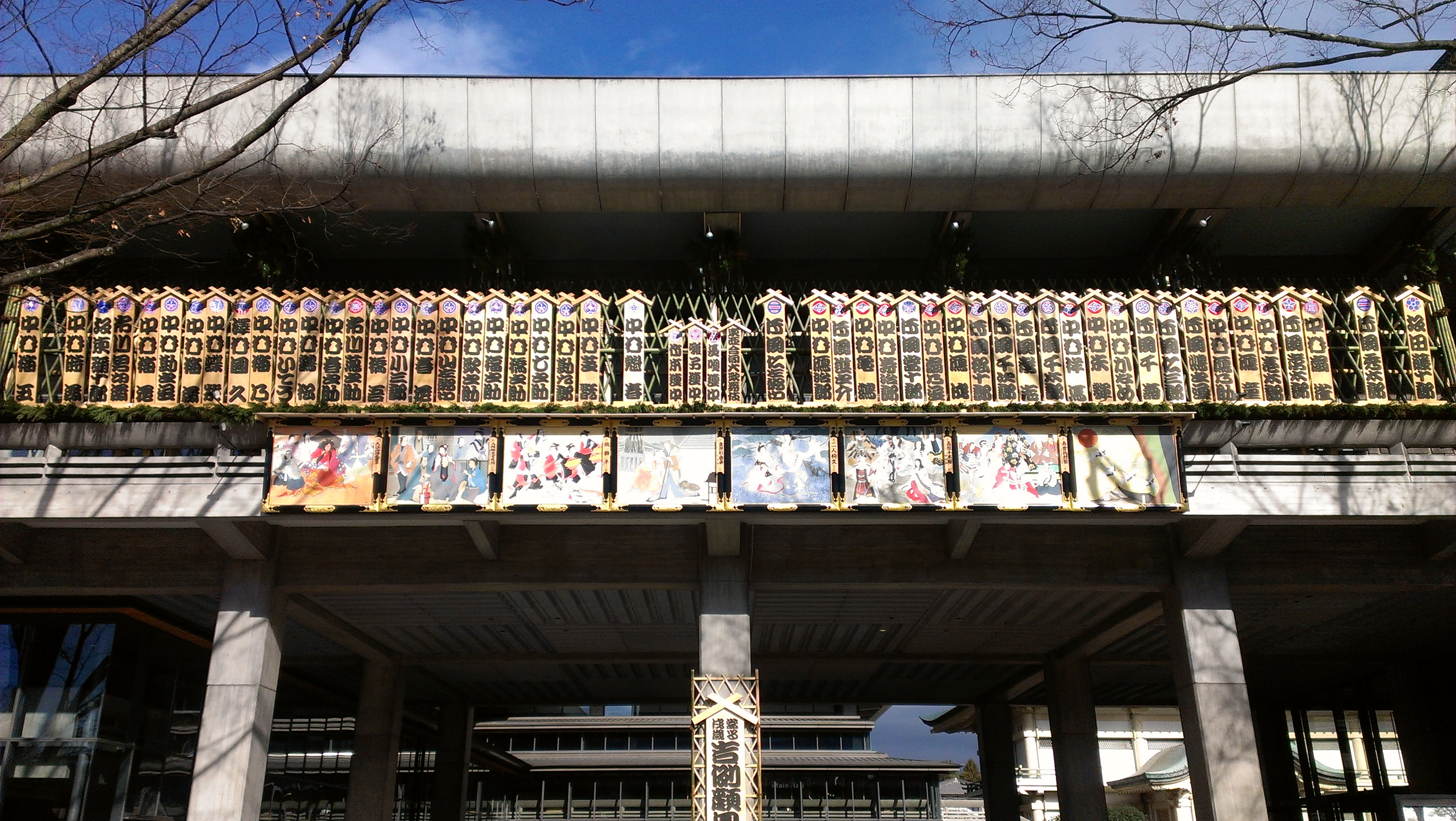 2017年12月ロームシアター京都『吉例顔見世興行』の招き看板